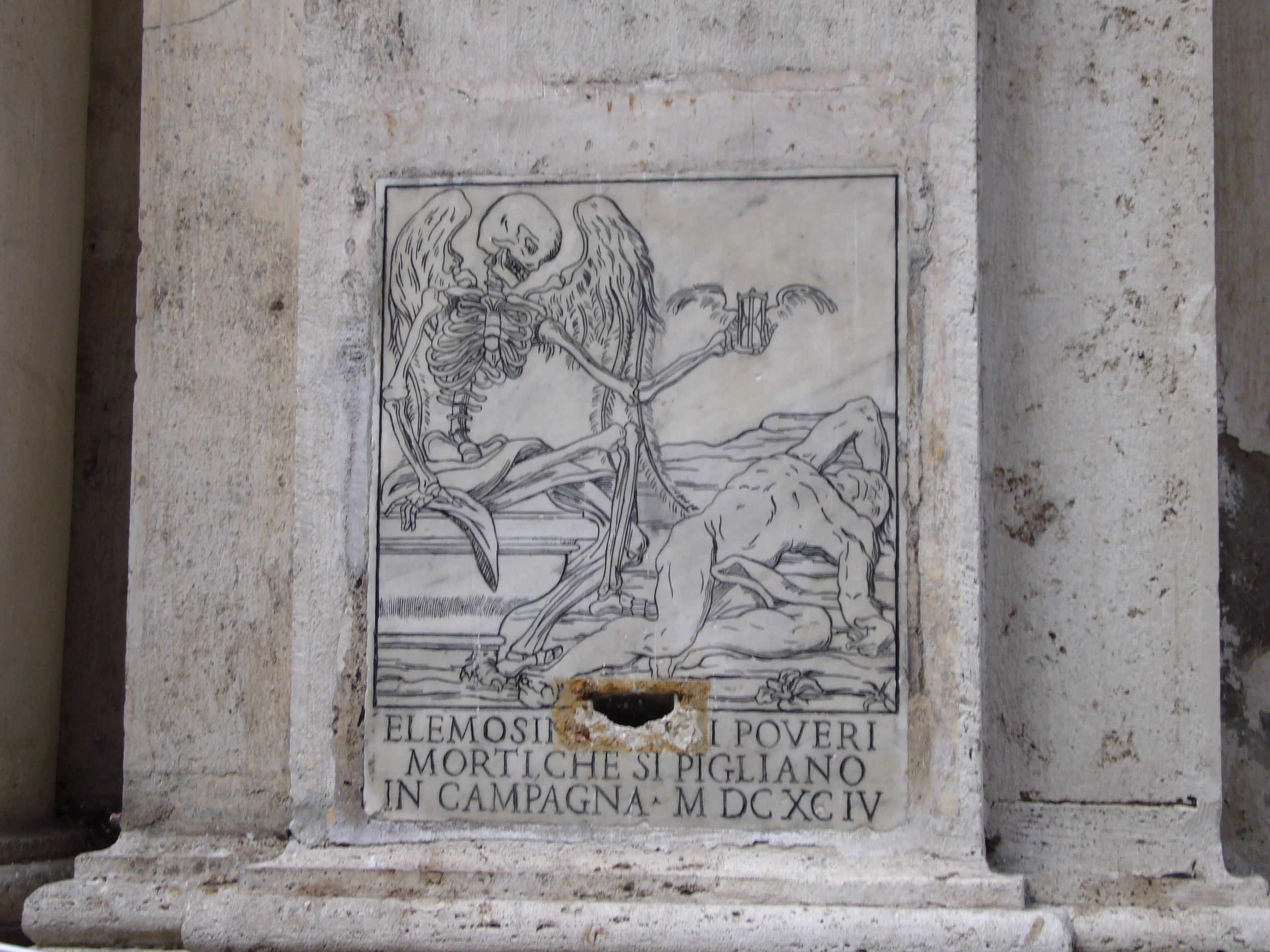 Roma, via Giulia: elemosiniera sulla facciata di Santa Maria dell'Orazione e Morte (1694). Giuseppe Gioacchino Belli (1791-1863) cita questa incisione come "la commare secca de strada Giulia". (The author of the engraving, dated 1694, died more than 70 years ago - therefore it is in the public domain). Photo by Lalupa